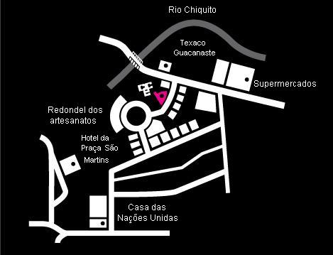 Mapa do CCET